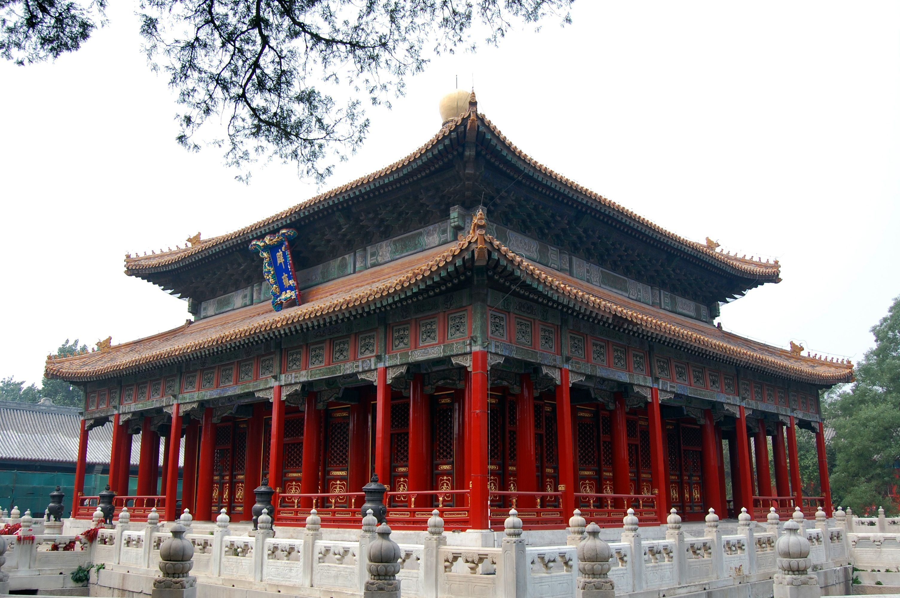 Beijing Guozijian